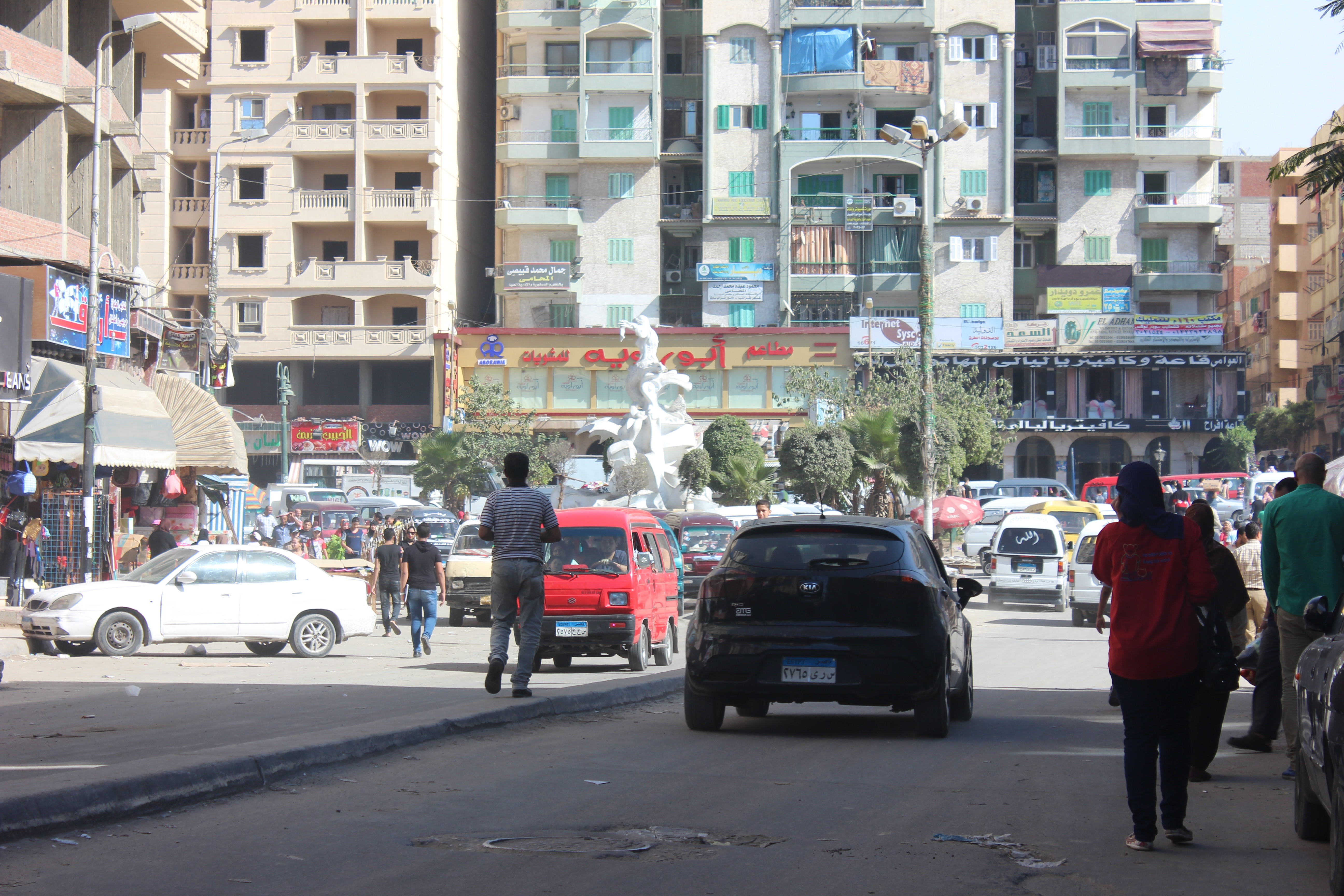 أحد مباني العجمي، مصر.